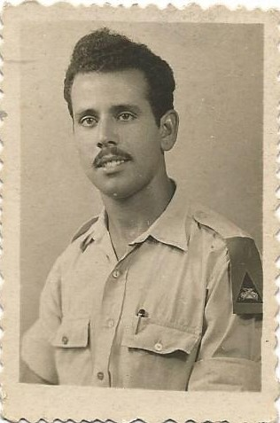 רפי וקנין במדים